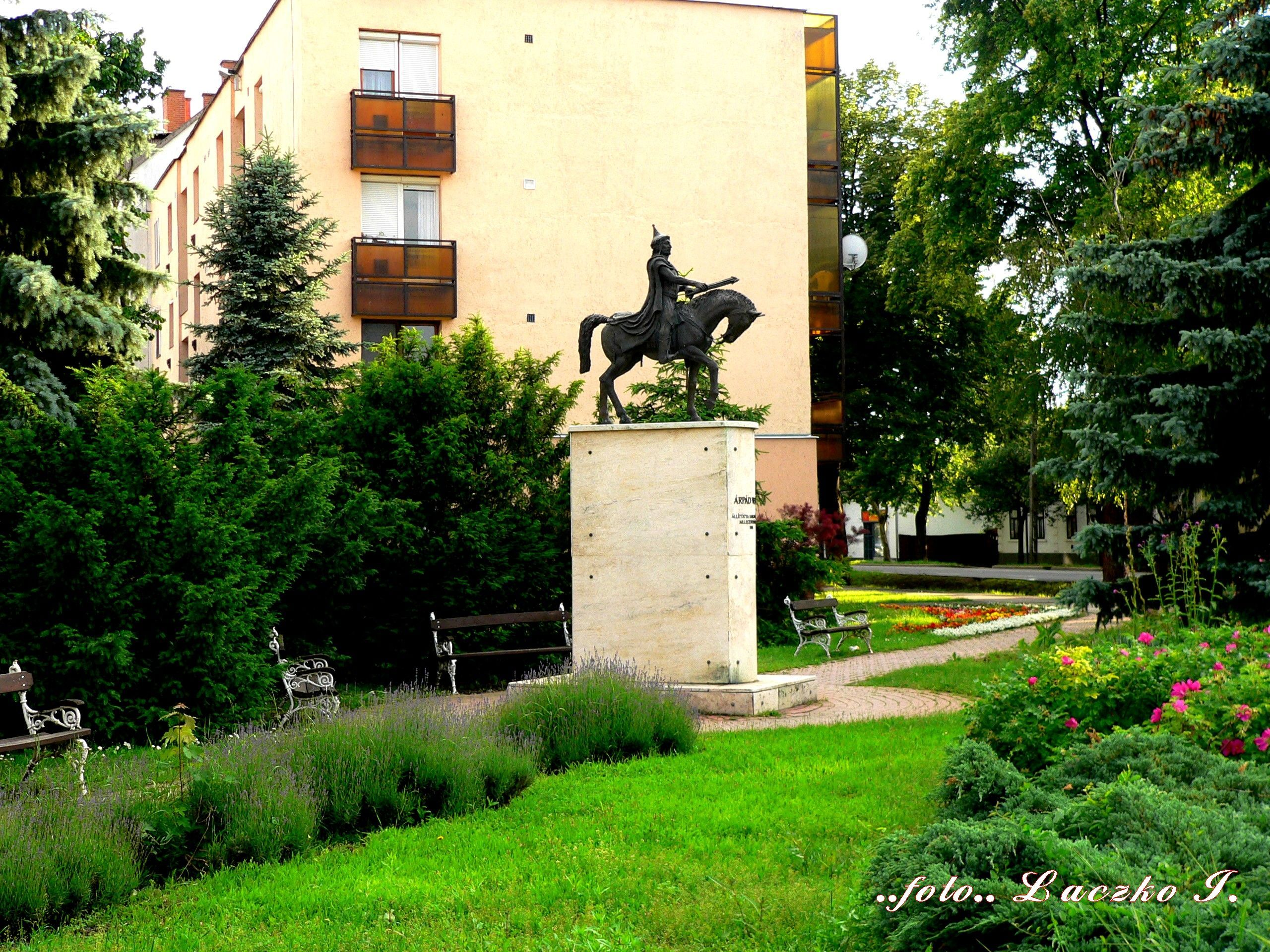 Árpád fejedelem lovas szobra (Adorjáni Endre, 1996), Magyarország, Békés megye, Sarkad, Árpád fejedelem tér, Árpád utca és Kossuth utca találkozásánál kialakított tér középpontjában.